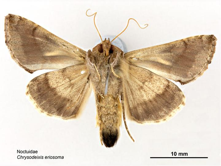 Chrysodeixis eriosoma ventral view